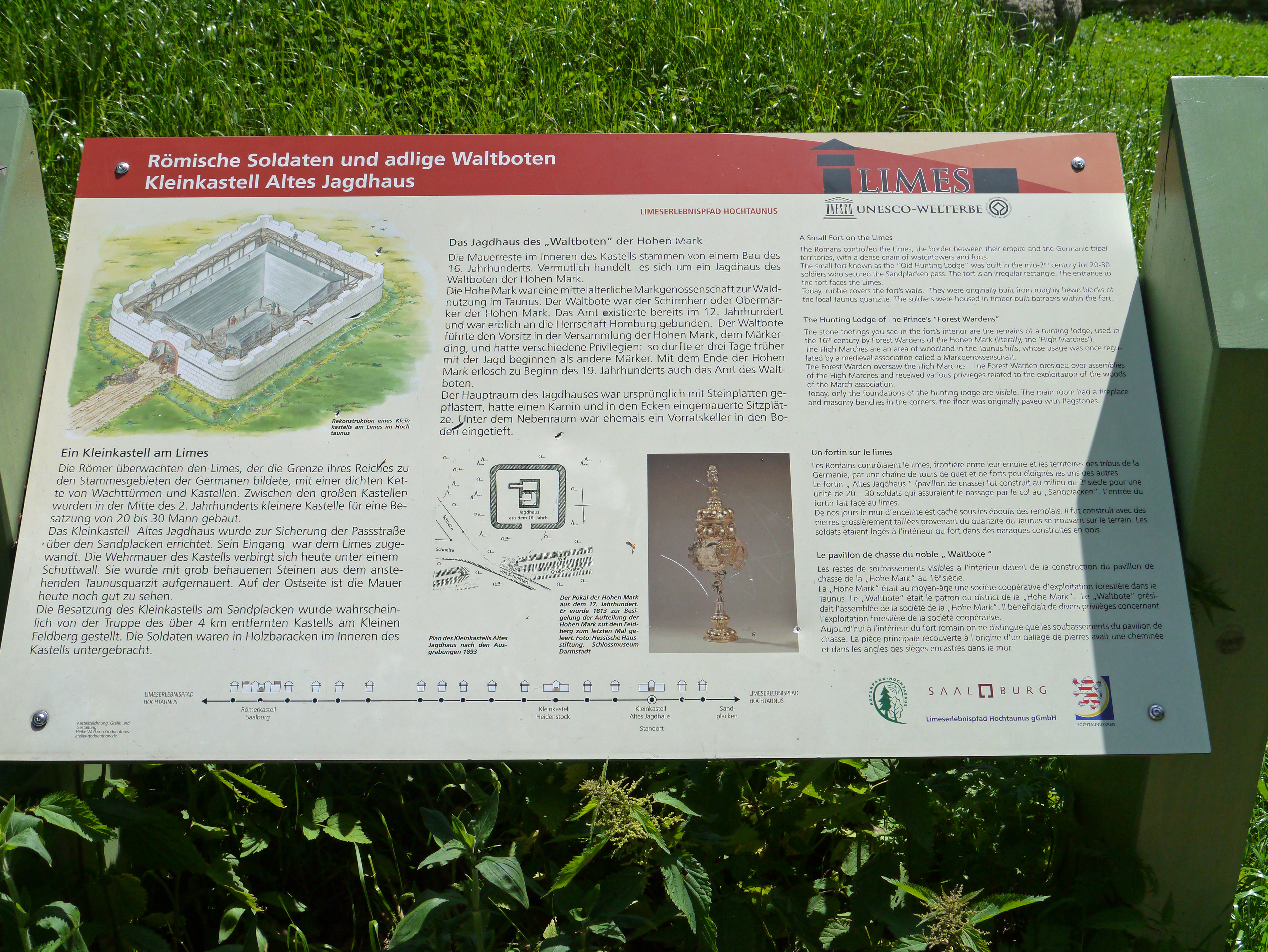 Infotafel am Kleinkastell Altes Jagdhaus im Taunus.